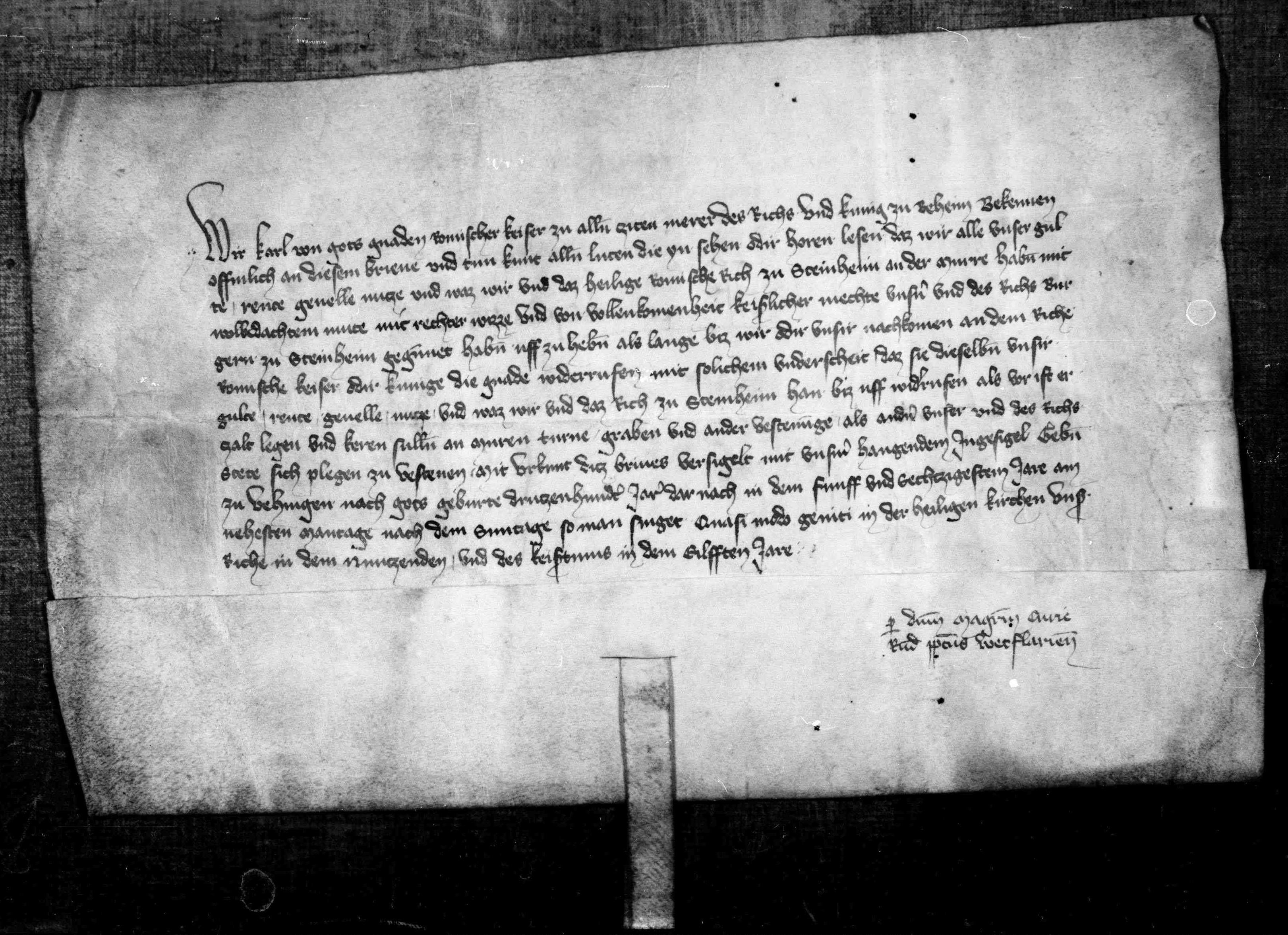 Urkunde: Kaiser Karl IV. erlässt den Bürgern Steinheim an der Murr die Abgaben, um die Stadtmauern und Gräben zu finanzieren.